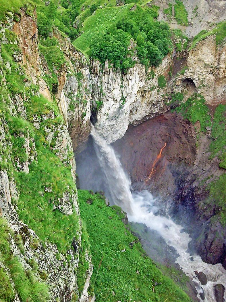 название